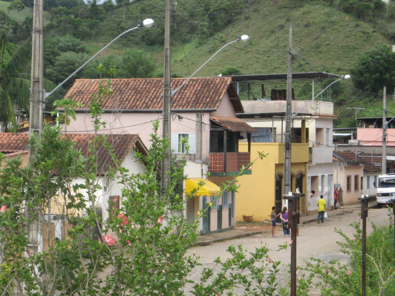 Vista da cidade mineira de Ewbank da Câmara.